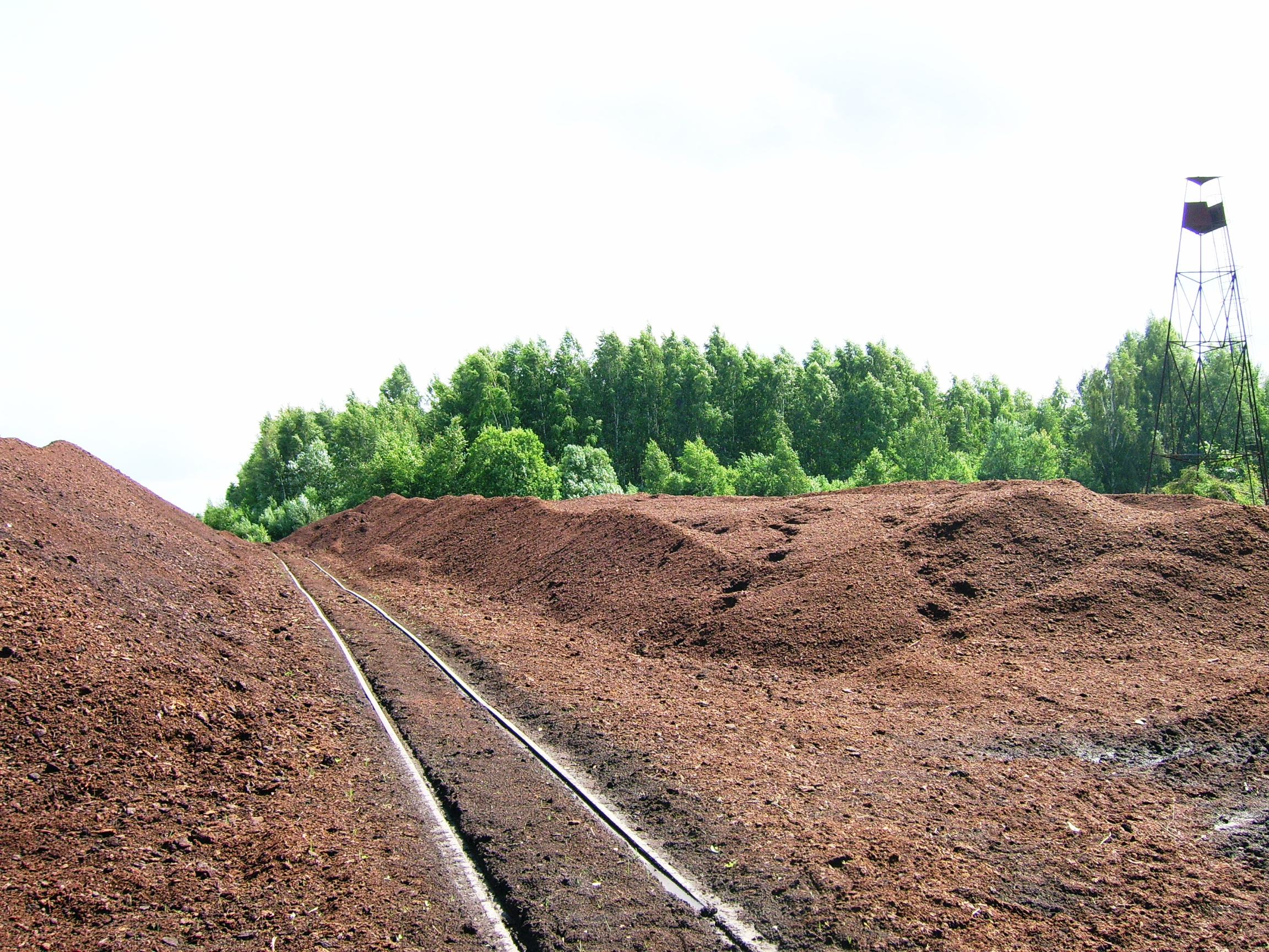 Laukėsos durpynas, Laukesos pelkė, į rytus nuo Eičių.